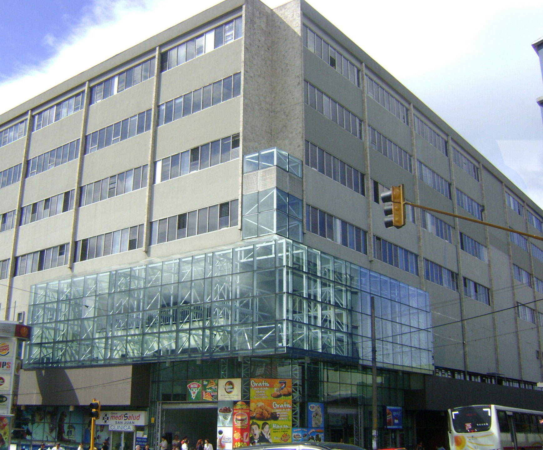 Edificio Rofas imagen con HDR